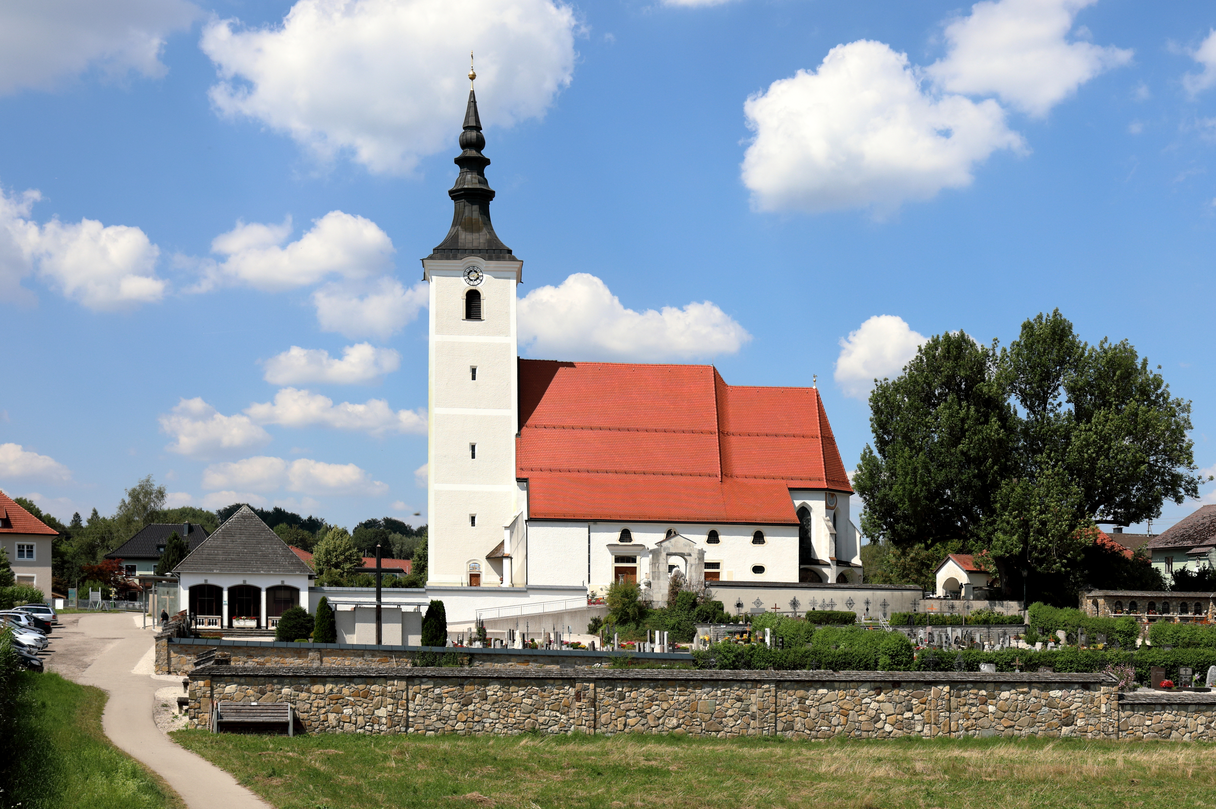 Südansicht der von einem Friedhof umgebenen röm.-kath. Pfarrkirche Hl. Jakobus der Ältere in der oberösterreichischen Marktgemeinde Seewalchen am Attersee und rechts die unter Naturschutz stehenden Friedhofsesche.Die gotische Kirche wurde Mitte des 15. Jahrhunderts errichtet und 1476 geweiht. Im 19. Jahrhundert fand eine Erweiterung des südseitigen Anbaus statt und der Turm wurde ebenfalls neu gestaltet. Von 1998 bis 2001 wurde die Pfarrkirche umgebaut, komplett renoviert und erweitert, dabei würde unter anderem nordseitig sozusagen ein linkes Seitenschiff errichtet.